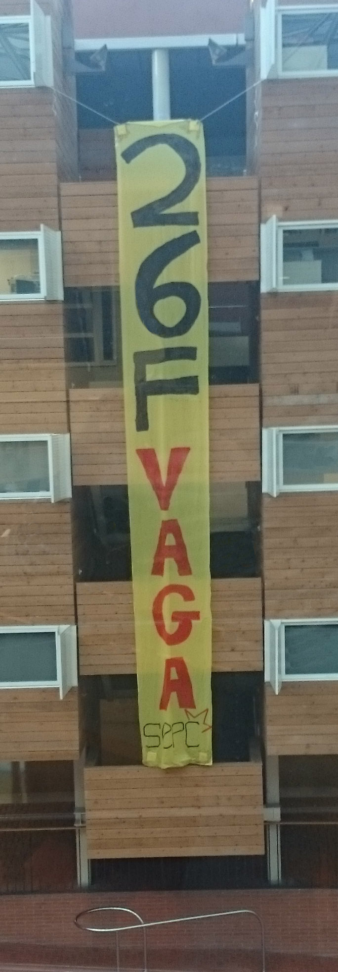 Pancarta del Sindicat d'Estudiants dels Països Catalans, al campus de Ciutadella de la Universitat Pompeu Fabra, convocant a la vaga educativa del 26 de febrer de 2015.